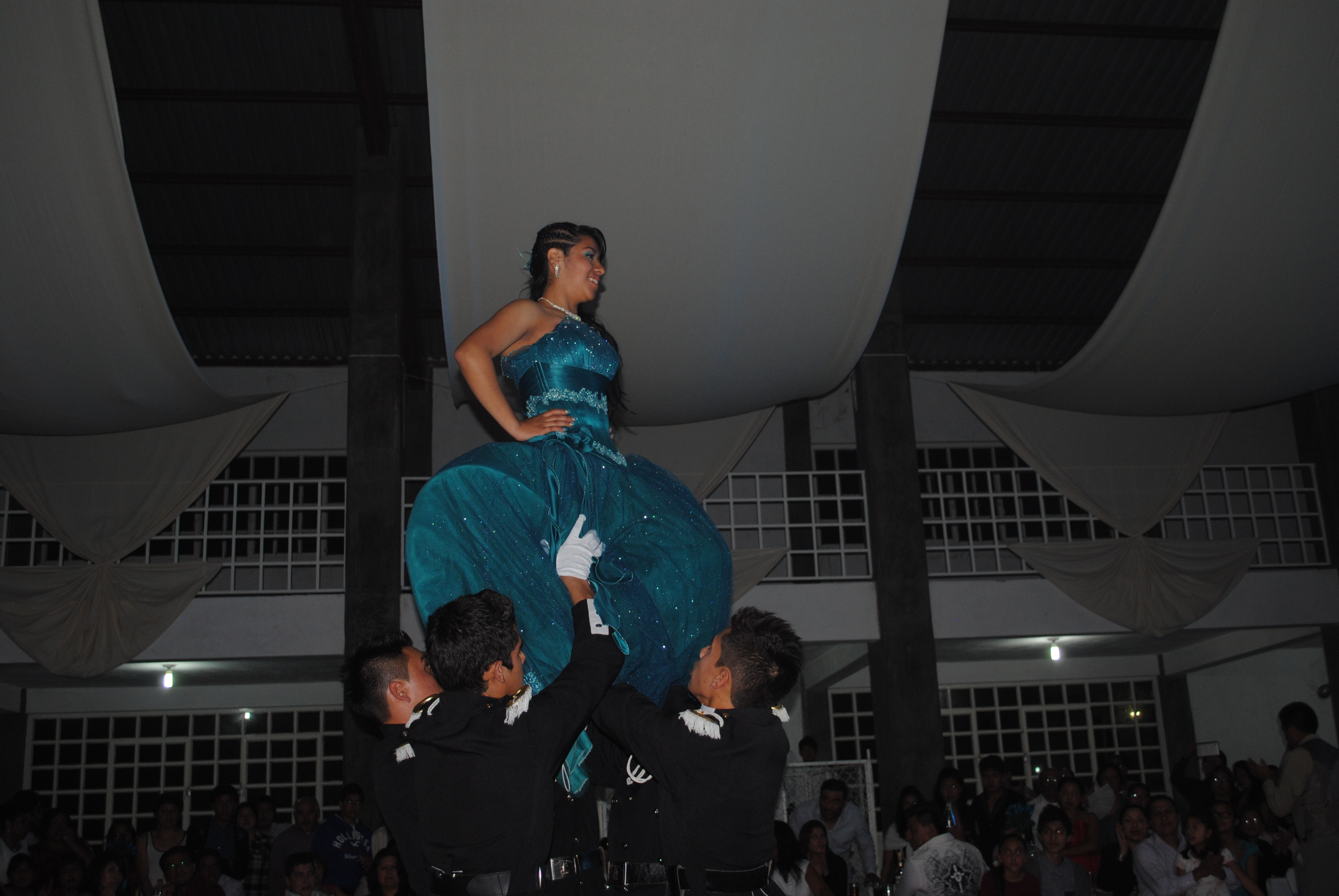 La fiesta de quince años en México consta en su mayoría de que las quinceañeras realizan un baile junto a sus chambelanes. Se ha ido modernizando cada vez más, por lo tanto se incluyen "cargadas", que muestran más a la quinceañera en el baile.